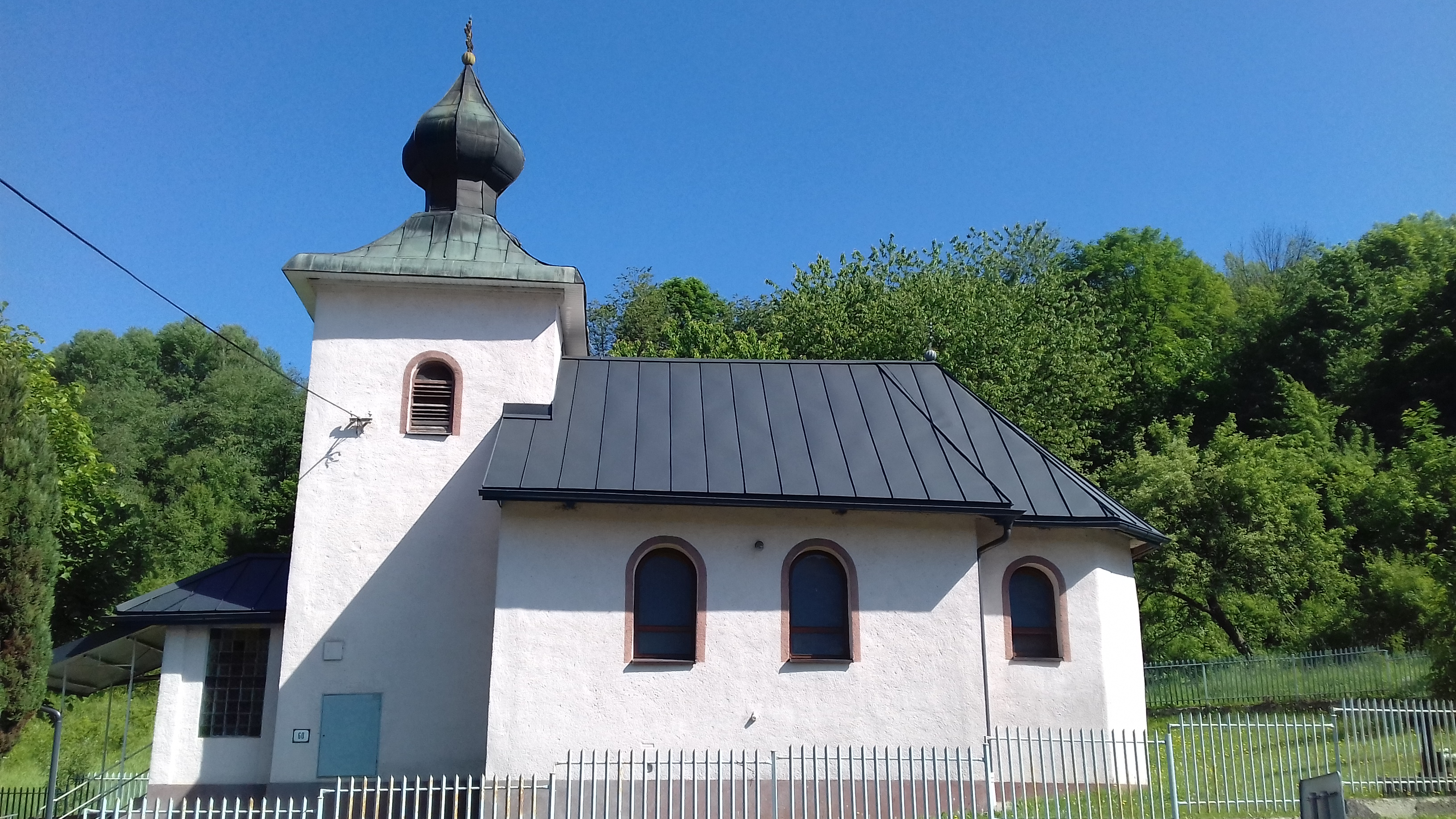 Krajná Poľana - cerkiew greko-katolicka